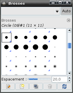 Boite à dialogue des brosses dans gimp